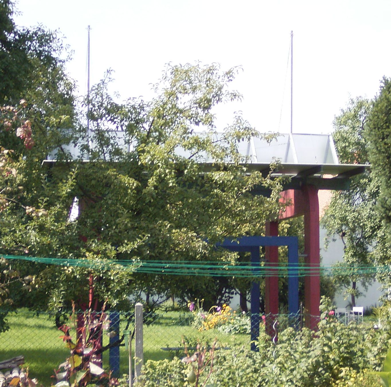 Teehaus im Garten des Geburtshauses von Karl-Georg Pfahler in Emetzheim bei Weißenburg i. Bay. Fotografiert von WMotzet am Sa. 13. August 2005